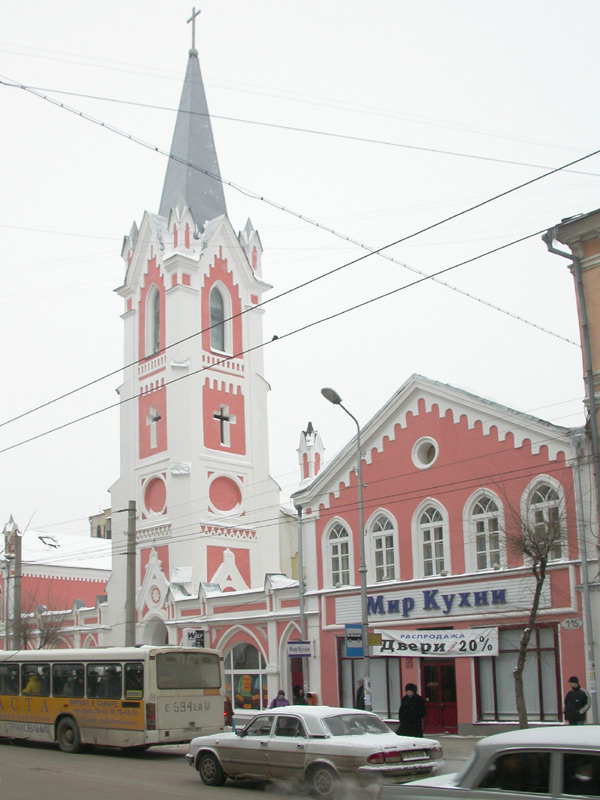 Samara